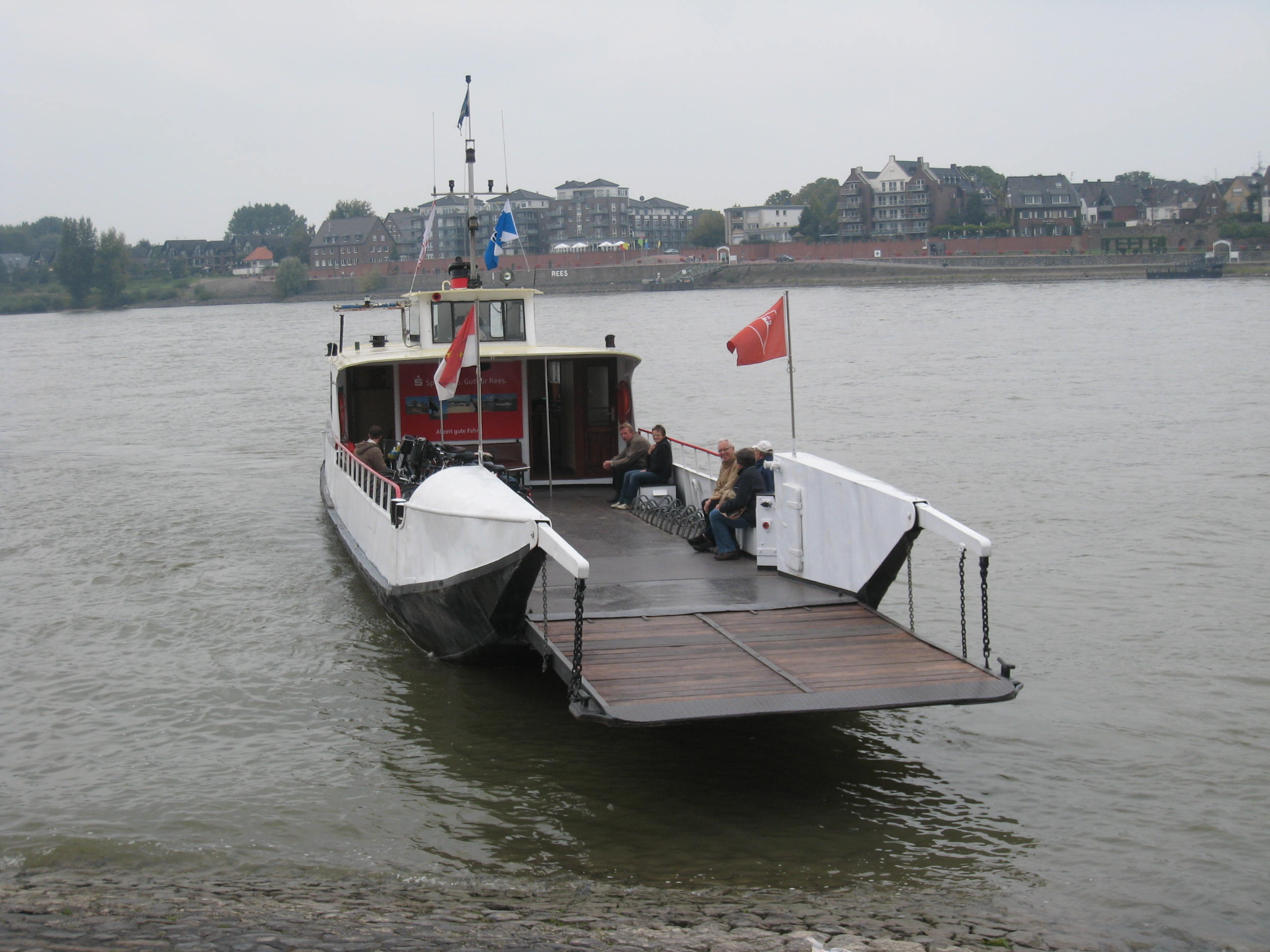 Rheinfähre von Rees nach Reeserschanz